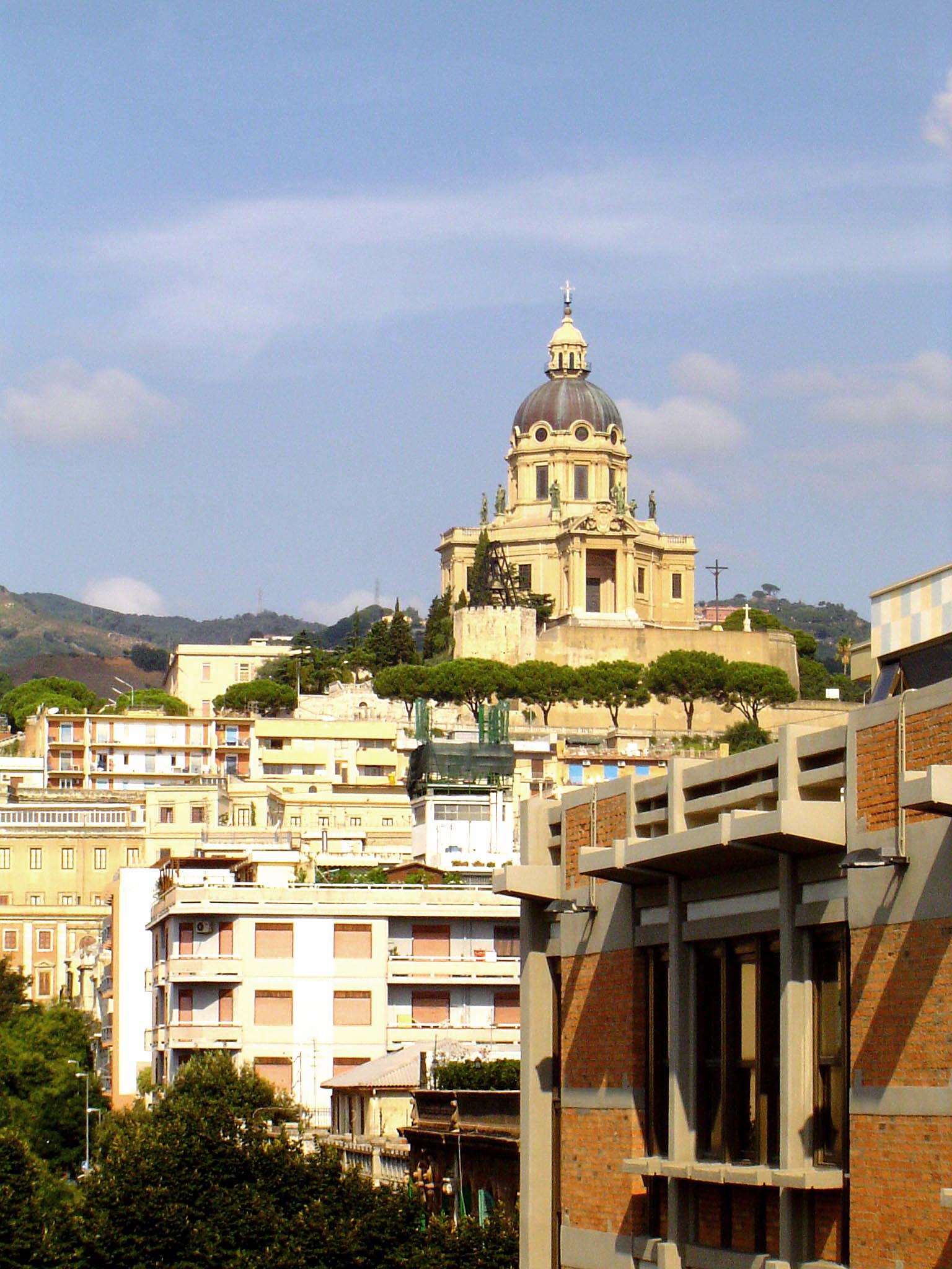 Vue op Messina, vum Hafen aus (2005)